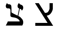 hebrew letter tsadi